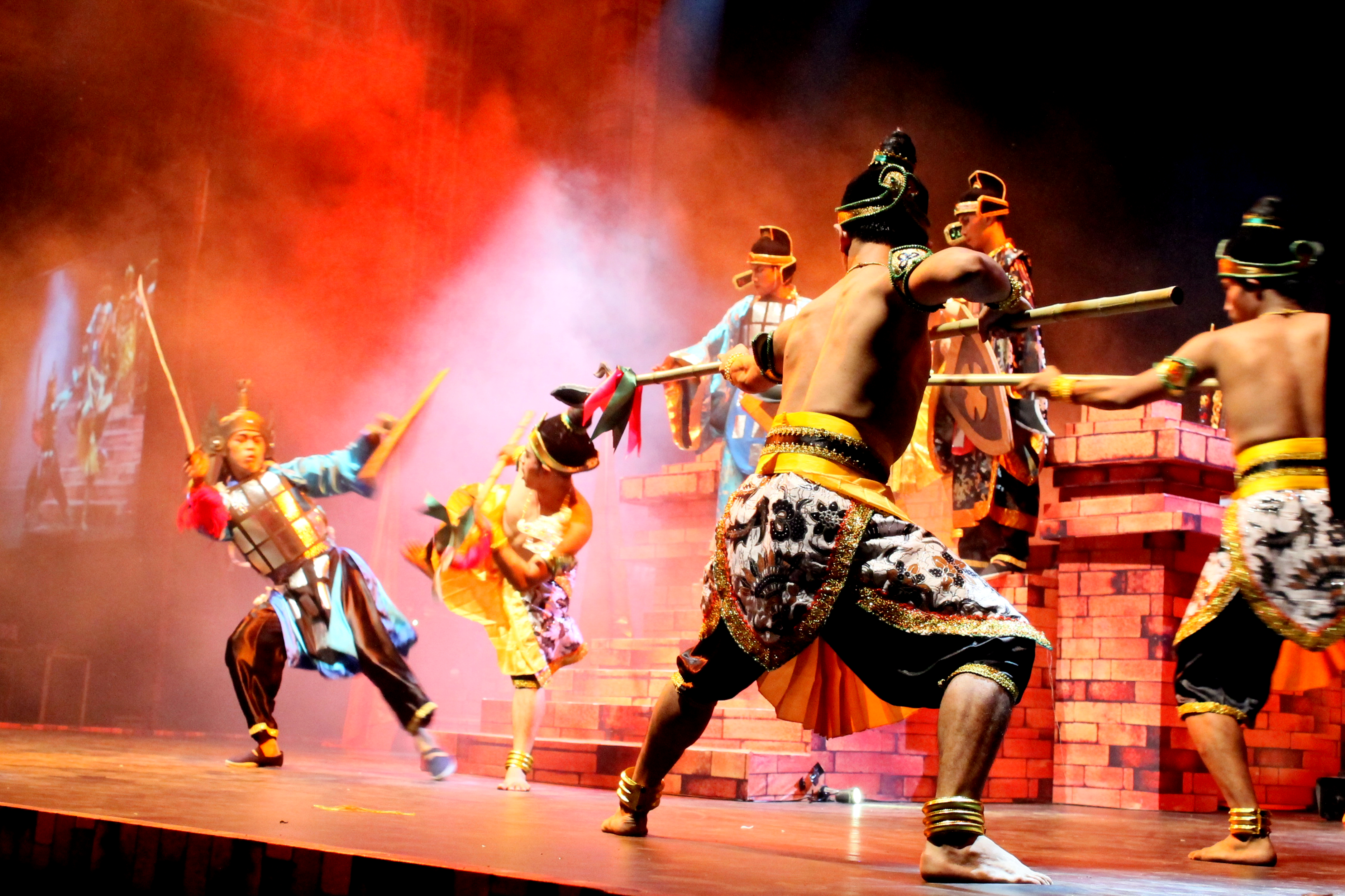 Pergelaran yang melibatkan 150 penari dari mahasiswa Fakultas Seni Pertunjukan (FSP), ISI Jogjakarta ini bertujuan untuk membangun karakter dan jati diri bangsa dan menggugah generasi muda agar tumbuh budaya dan perhatian. Pergelaran ini pun dapat digunakan untuk menggali dan menemukan para profesional.Dengan pergelaran ini diharapkan masyarakat dapat lebih memiliki situs-situs bekas kerajaan Majapahit ini membuat kepedulian untuk menjaganya